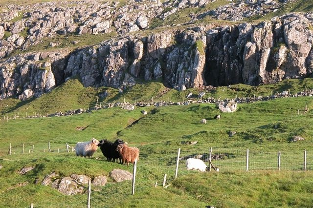 Schafe von Víkarbyrgi (Färöer)